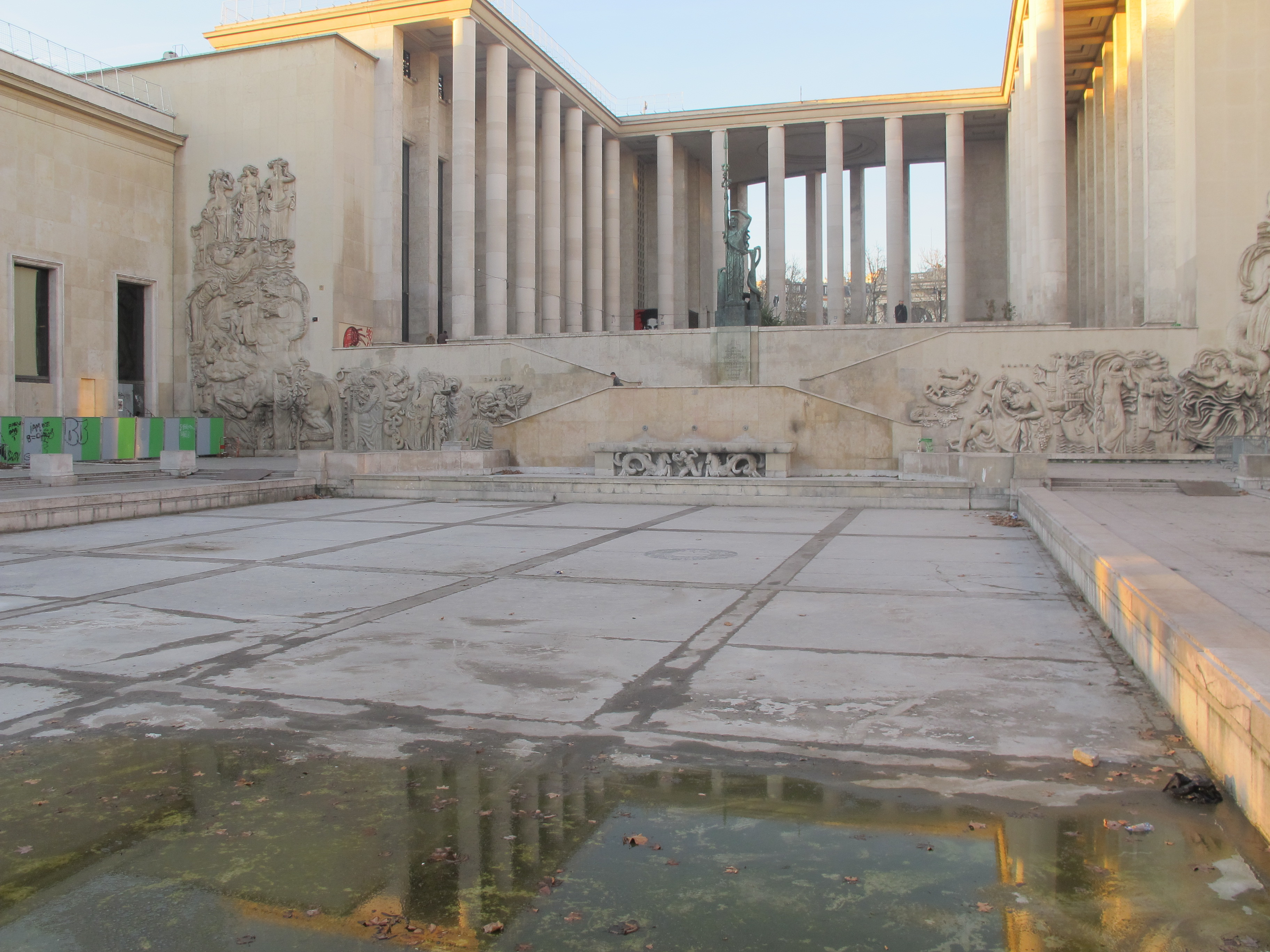 Vue du palais de Tokyo dans la lumière de fin de journée.